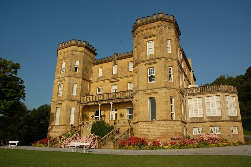 Torre Satrústeguii en San-Sebastian